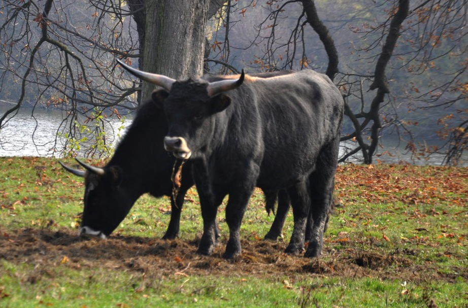 Hausrinder der Rasse Heckrind im Lainzer Tiergarten.